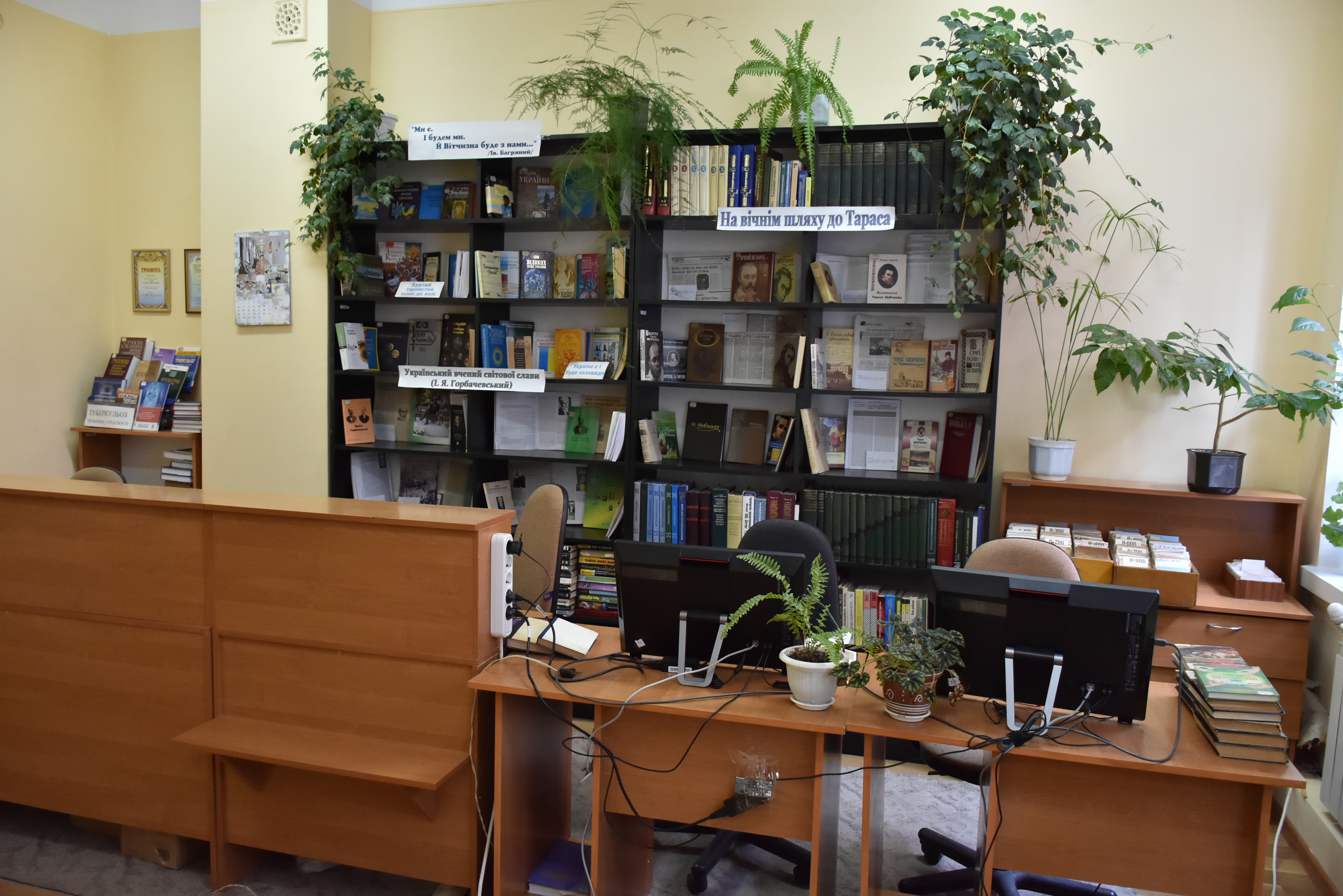 Бібліотека Тернопільського державного медичного університету імені І. Я. Горбачевського.